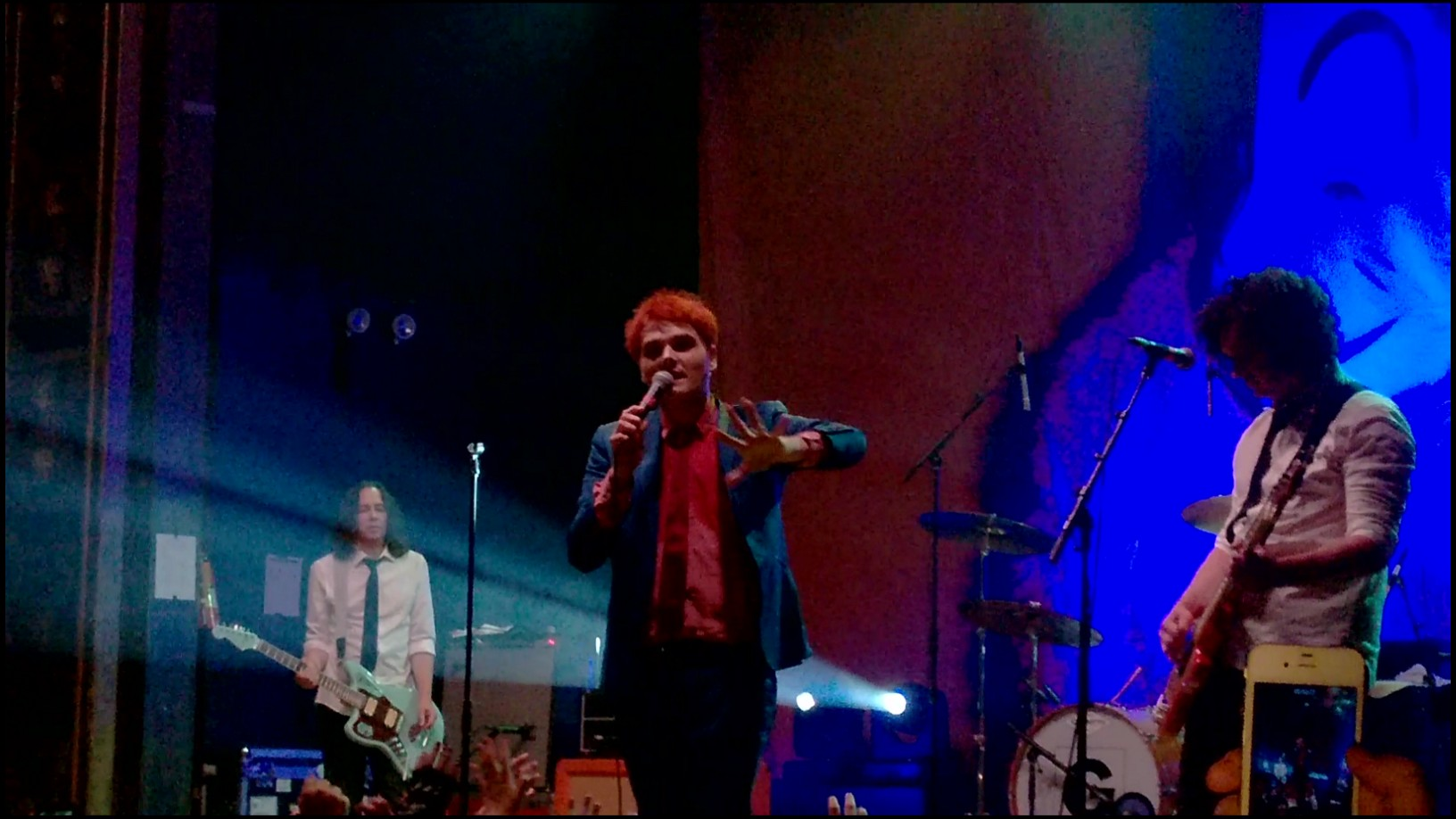 Gerard Way en su concierto en el Webster Hall de Nueva York (Estados Unidos).